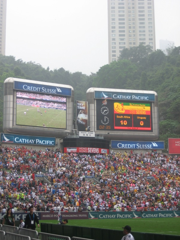 Hong Kong Rugby Sevens